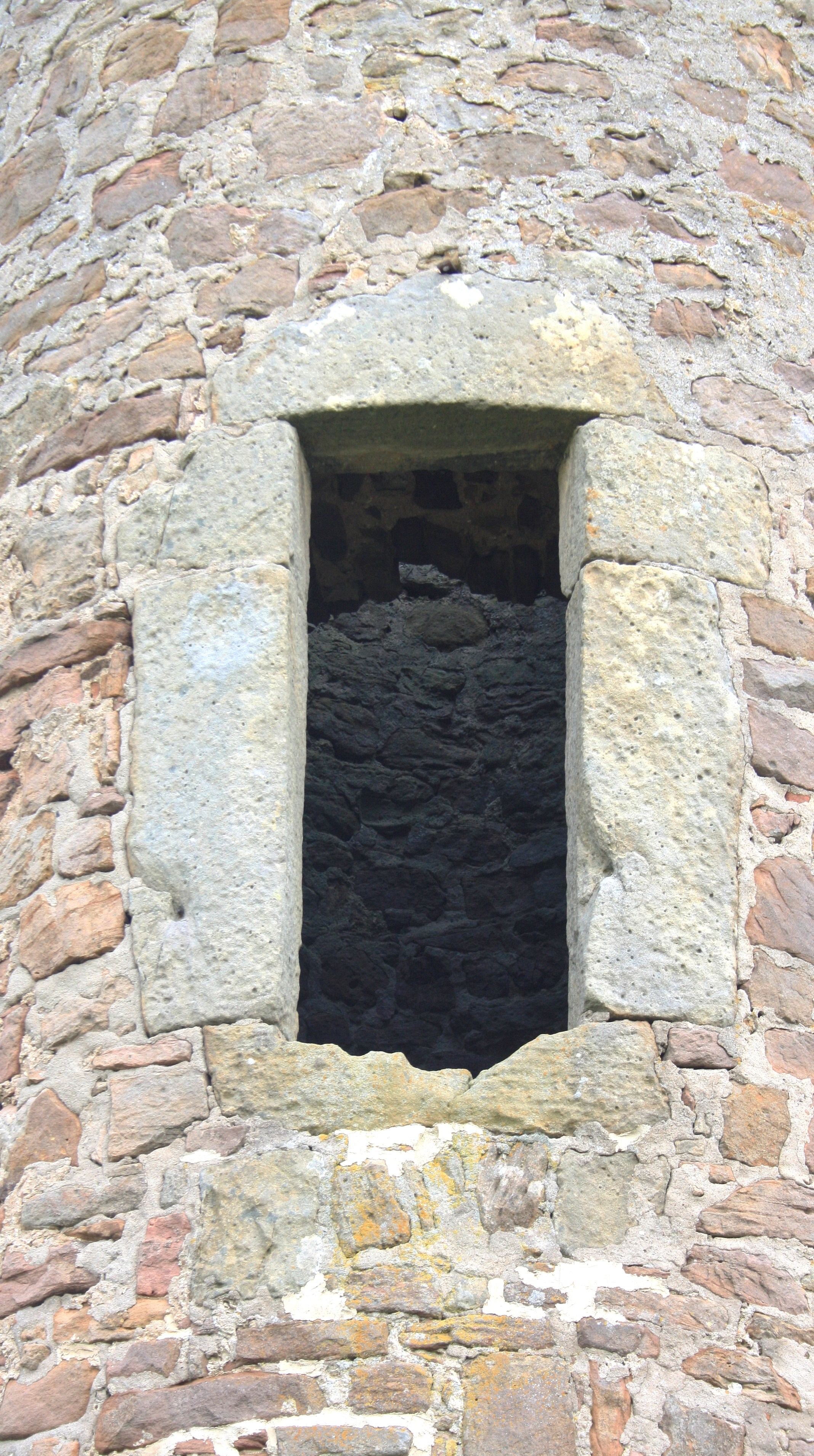 Der Edelsturm bei Fulda-Kämmerzell